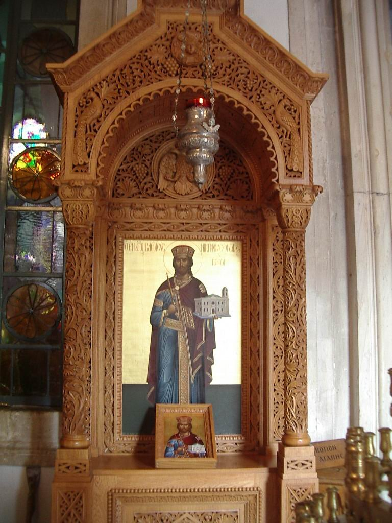 Interior de l'esglèsia de Sant Tit a Heràkleion, foto feta per J. Ollé l'agost del 2005